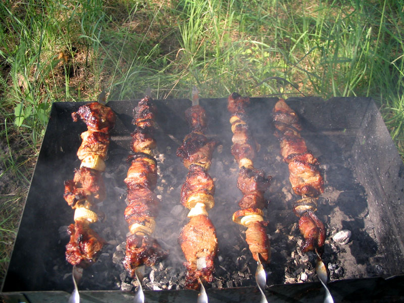 Шашлык.